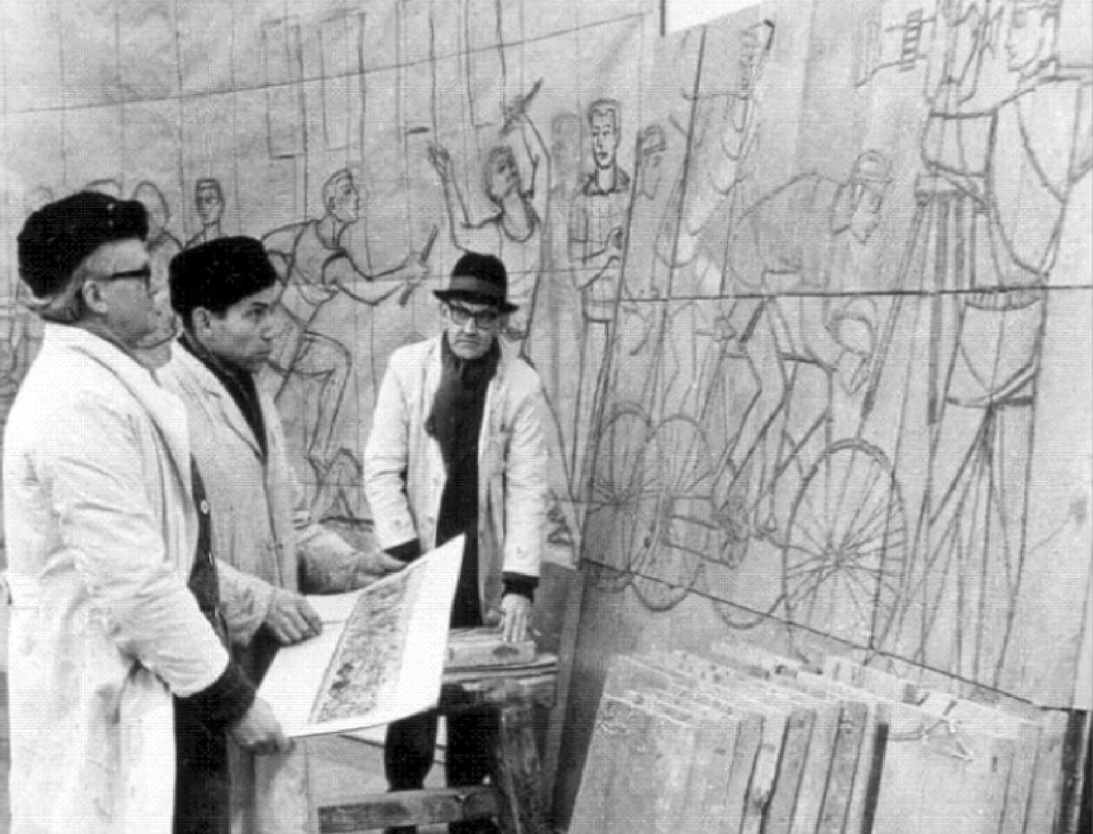 v.l.n.r. Rudolf Fleischer, Johannes Belz, Rudolf Kraus bei den Arbeiten zu den Bleiintarsien 1964/65